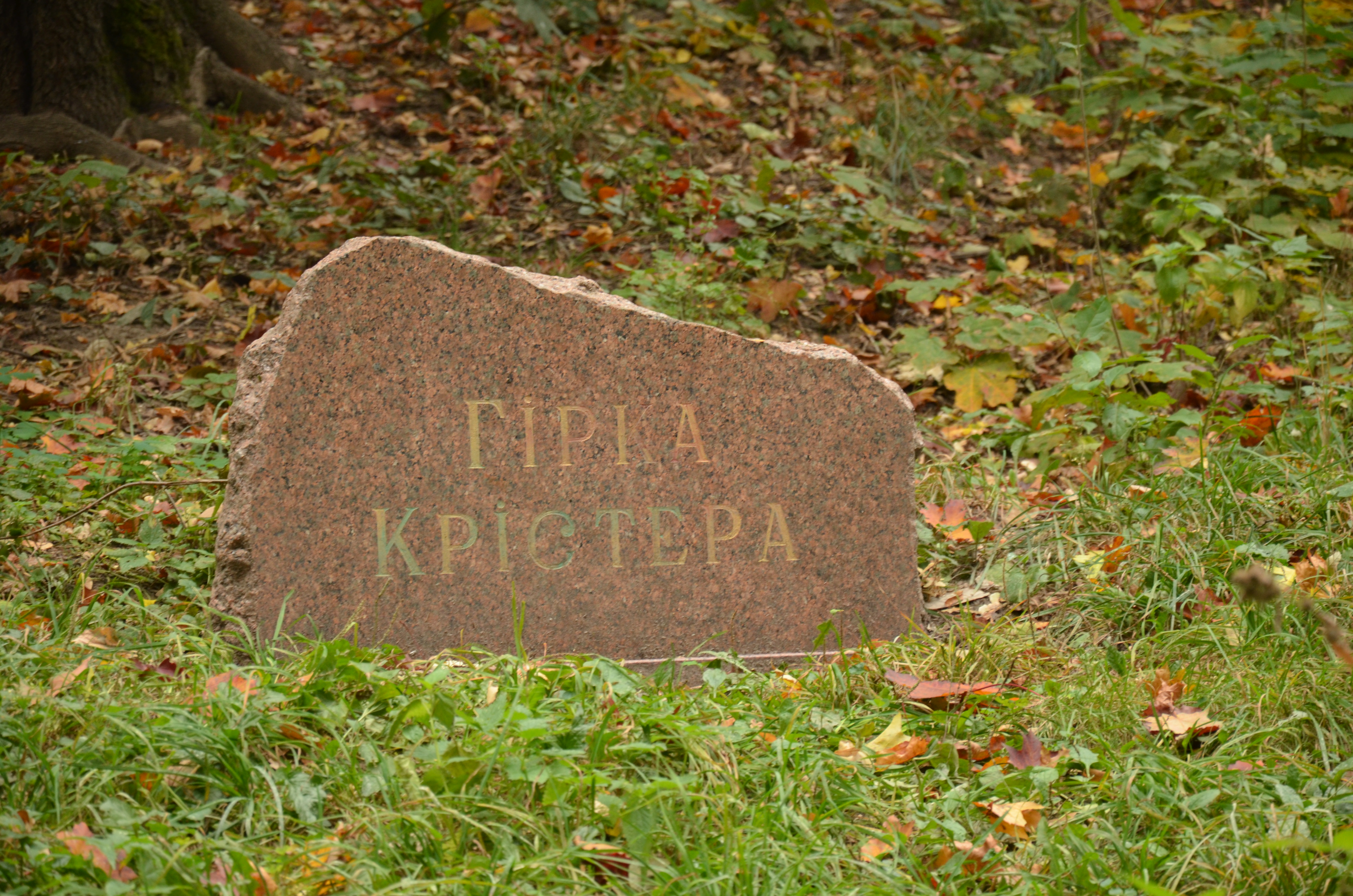 Крістерова гірка, Подільський район вул. Осиповського,1